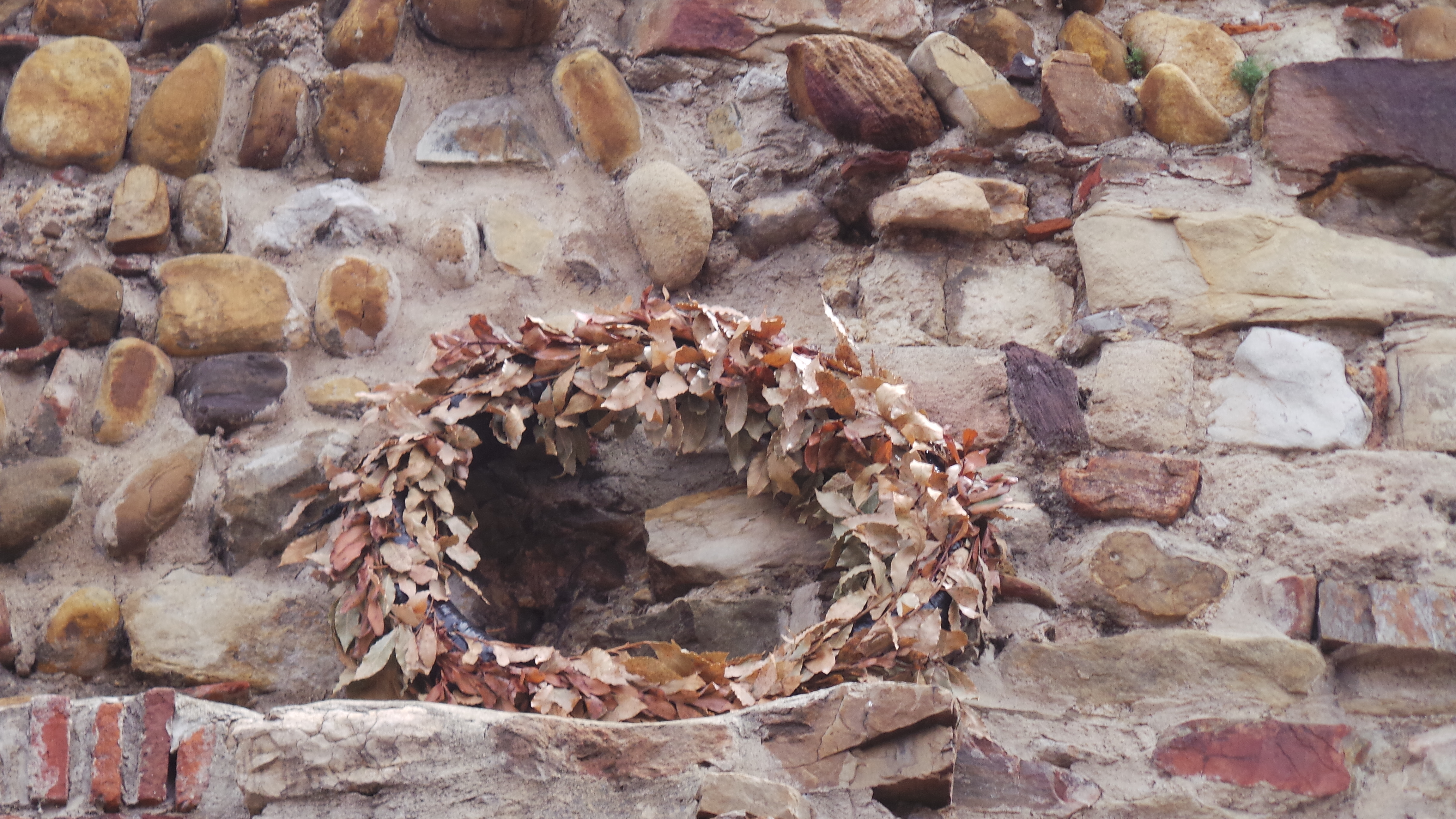 Ofrenda anual a Genarín, en la muralla romana de la ciudad de León.